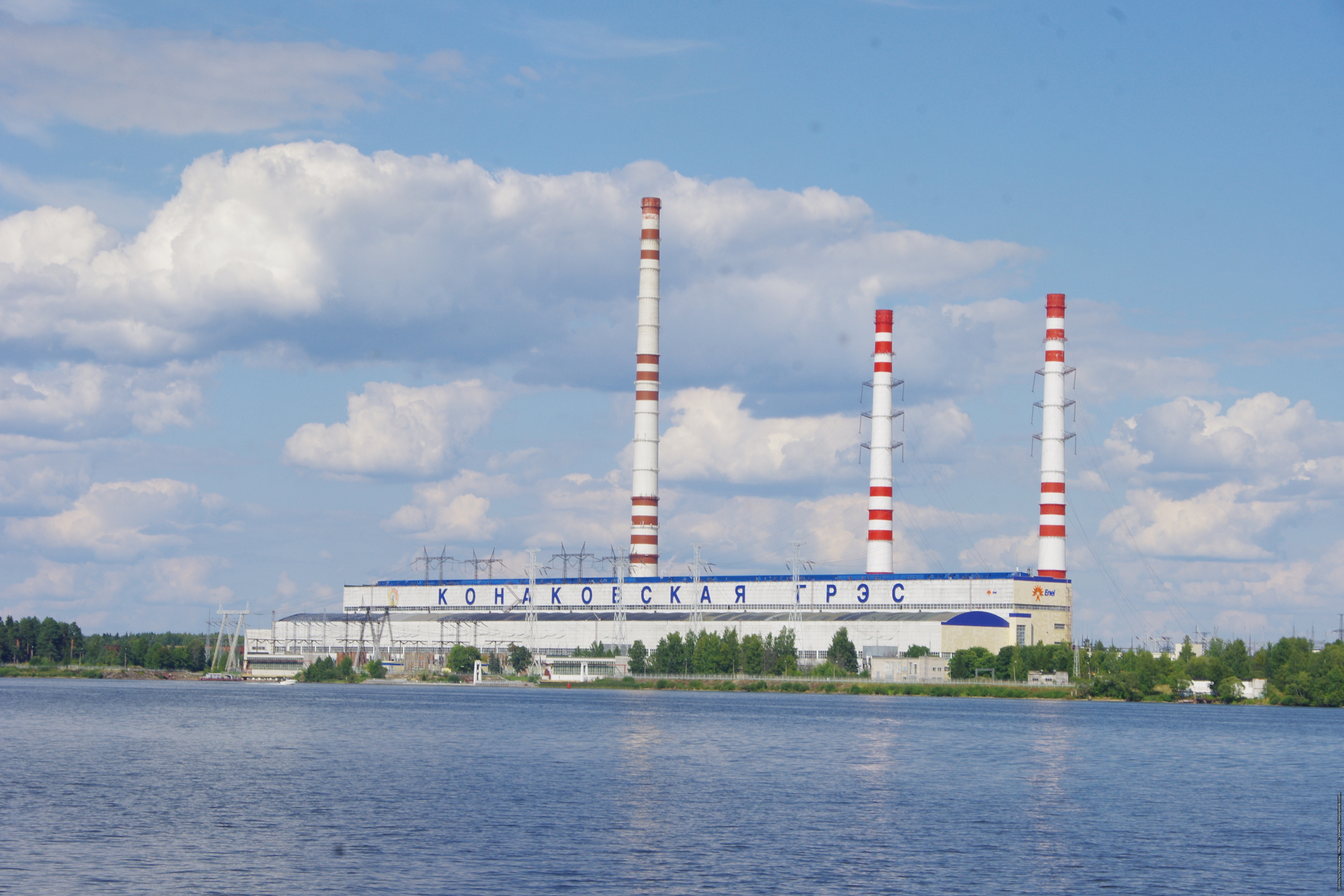 Unnamed Road, Konakovo, Tverskaya oblast', Russia, 171255